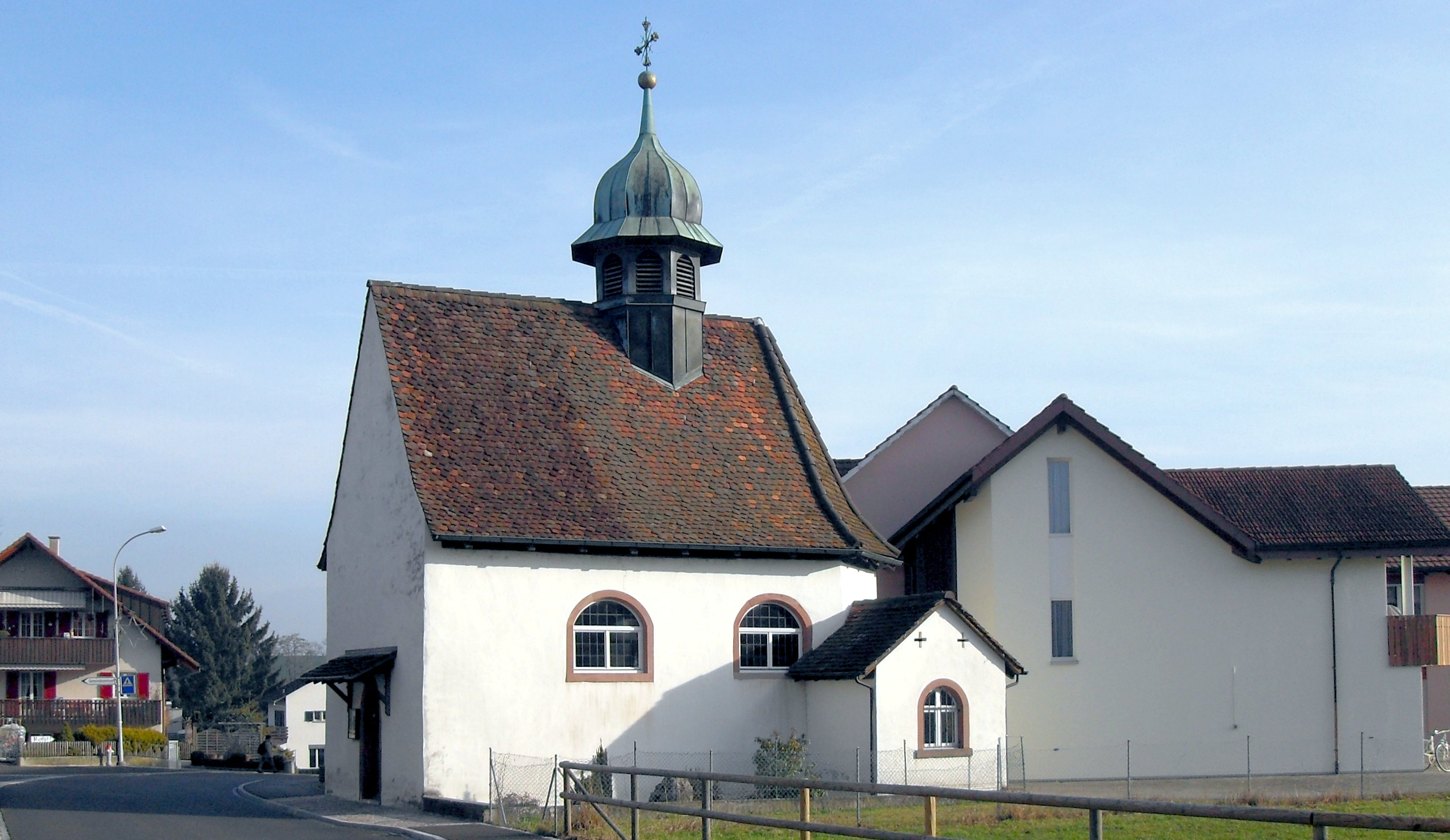 Die christkatholische Sebastianskapelle in Wallbach, Kanton Aargau, Schweiz